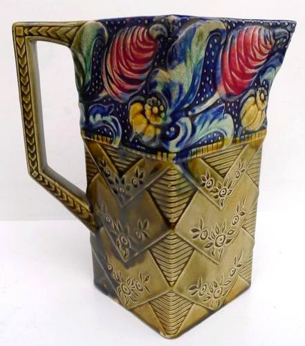 Pichet Celeste, n° 863, Faïence d'Onnaing, France XIXe siècle